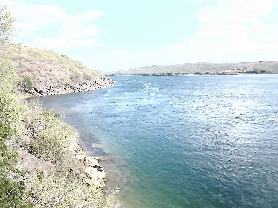 Fotografia do rio São Francisco tirada da cidade de Belo Monte, interior de Alagoas.